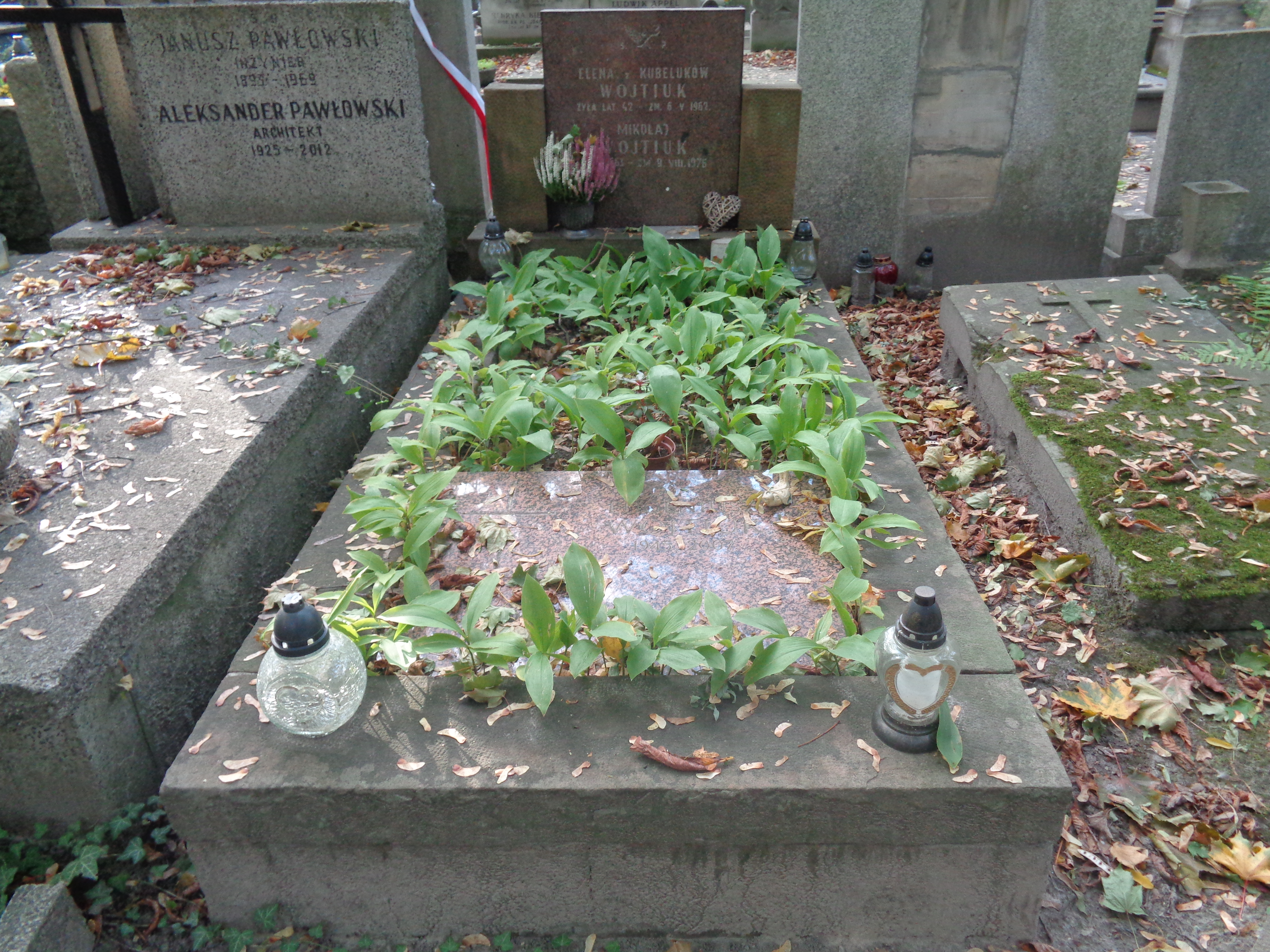 Grób ;pl: na cmentarzu powązkowskim